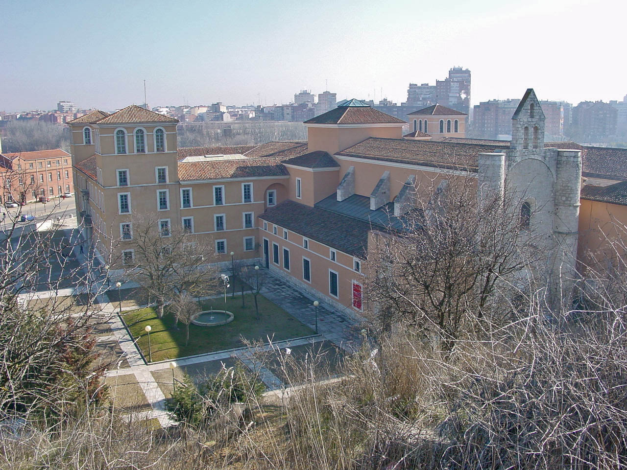 Valladolid, España. Monasterio jerónimo de Nuestra Señora del Prado, edificio del siglo XVII. Vista general aérea.